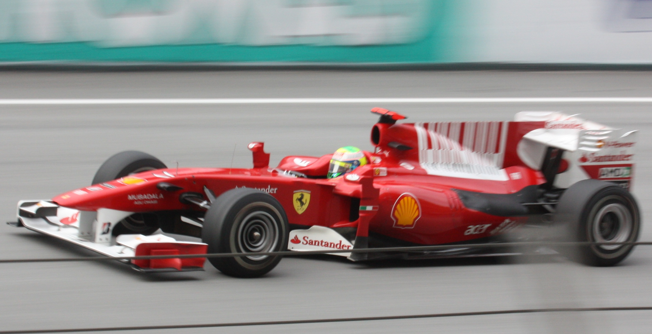 Massa Malaysia